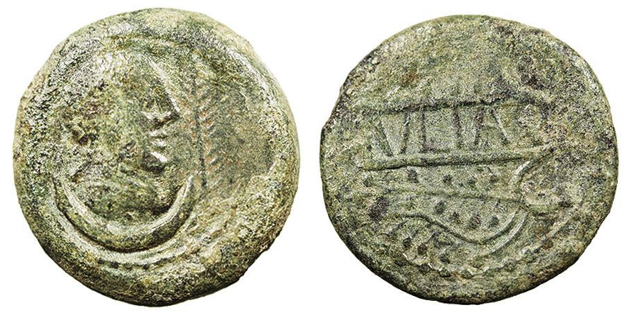 As de bronce acuñado en Ulia, cerca de la actual Montemayor (provincia de Córdoba, España). En el anverso muestra una cabeza humana, una palma y un creciente; en el reverso unas ramas de vid y la leyenda "VLIA".